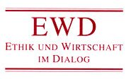 Logo der Forschunsgruppe EWD - Ethik und Wirtschaft im Dialog